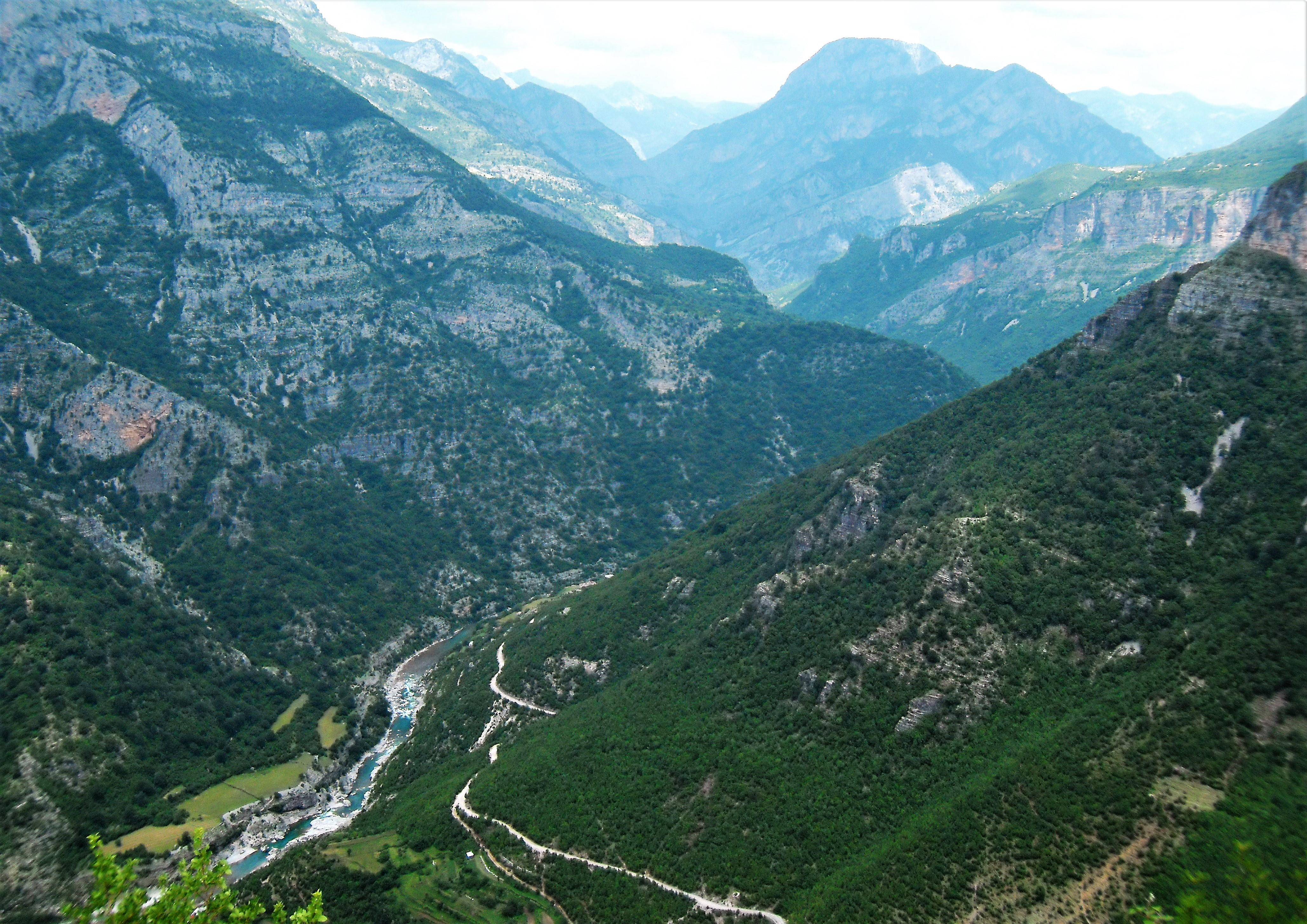 Blick von Broja ins Tal von Tamara, Albanien